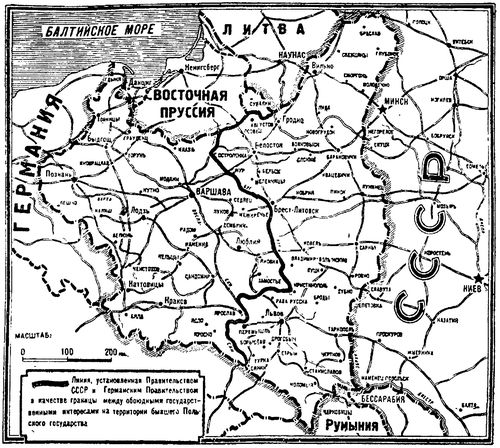 Карта, показывающая новую Советско-Германскую границу по дополнительному соглашению от 28 сентября 1939 года.